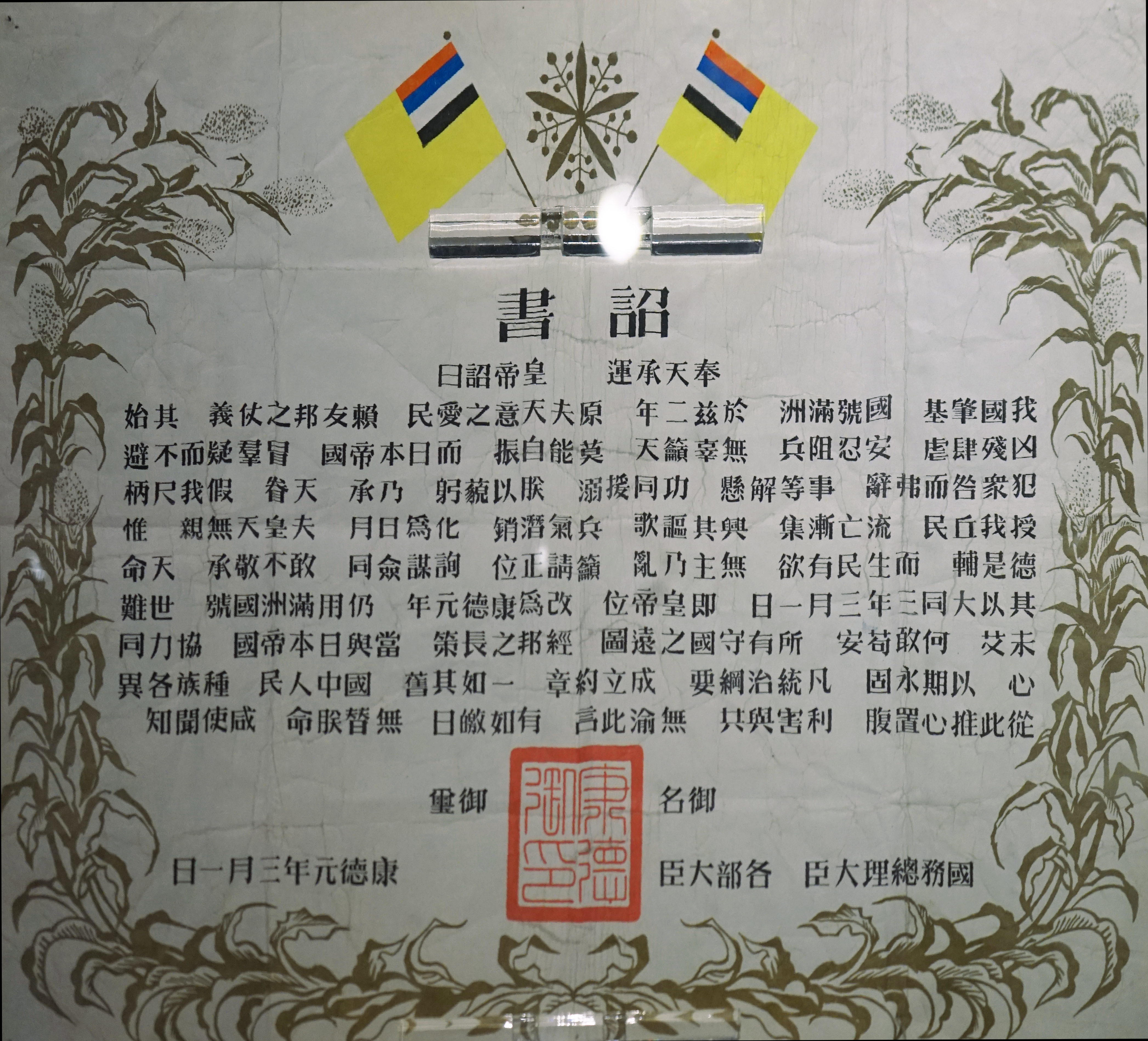 伪满皇帝溥仪颁发的即位诏书